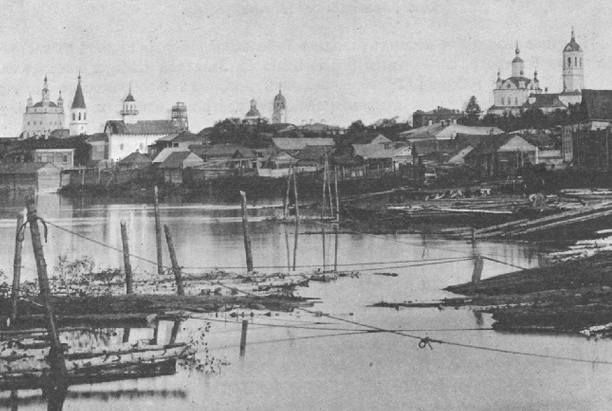 Уездный центр - город Тара